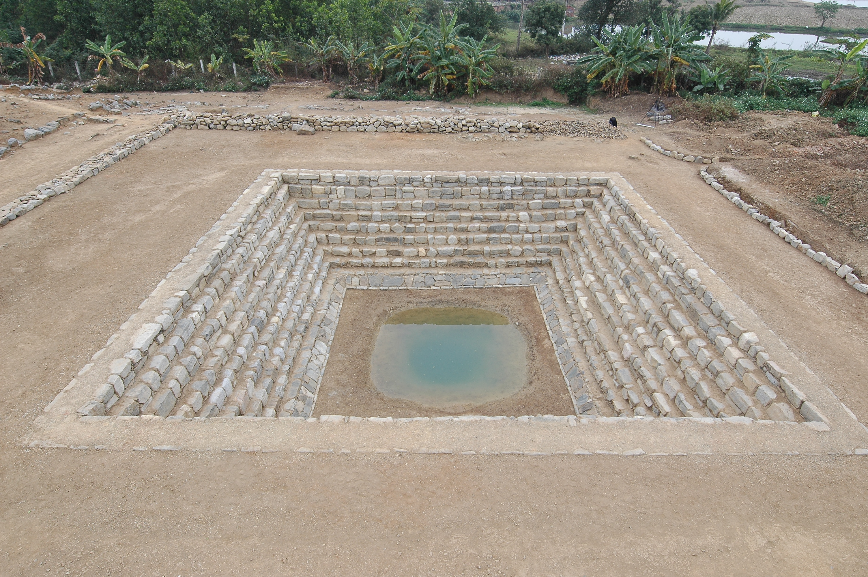 Giếng Vua, Tây Đô